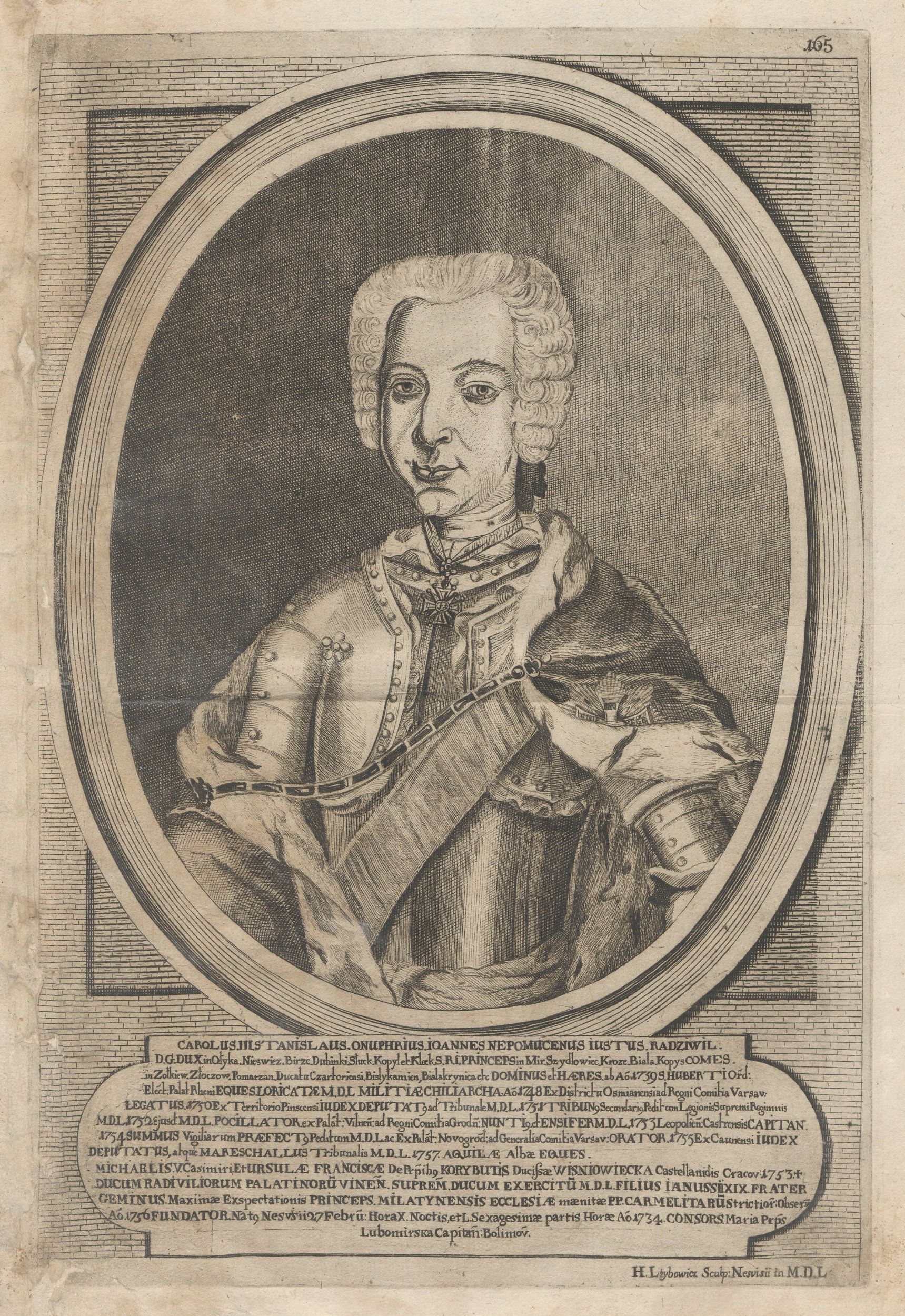 Беларуская (тарашкевіца): Партрэт Караля Станіслава Радзівіла «Пане Каханку» (Karal Stanisłaŭ Radzivił «Panie Kachanku»)